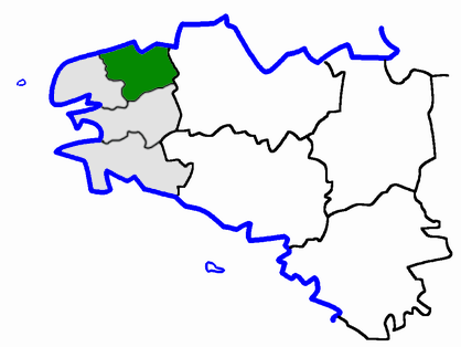 Arrondissement of Morlaix, Département Finistère, France